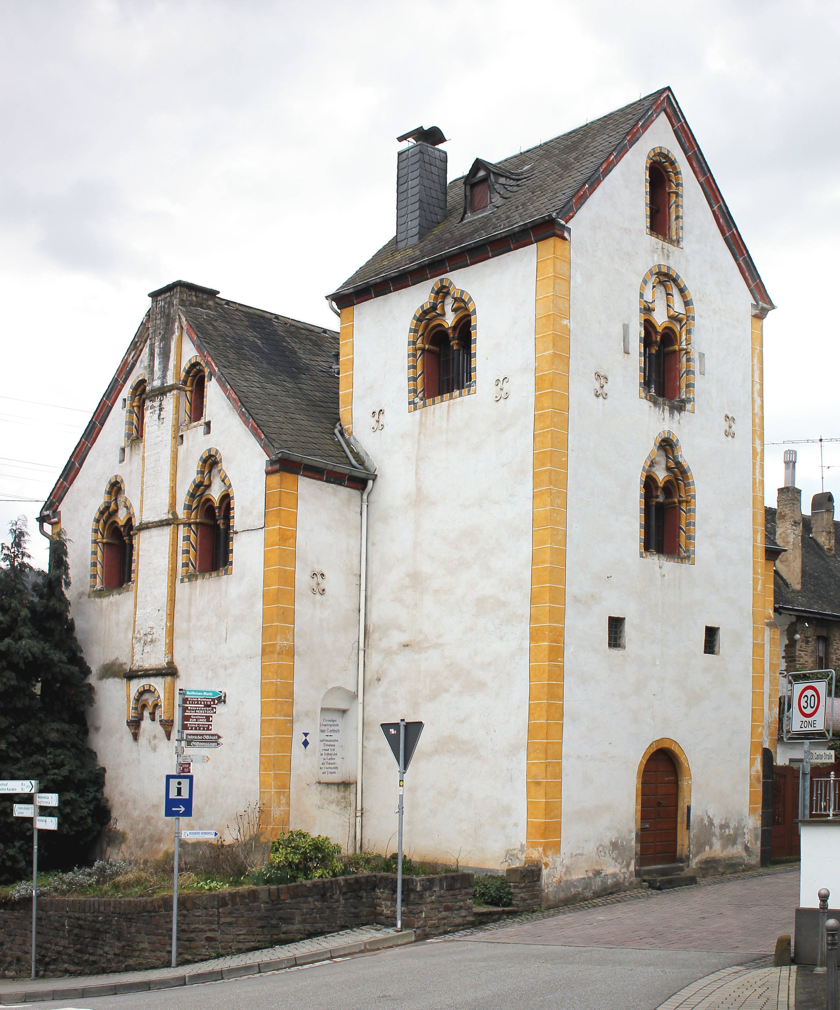 Haus „Korbisch“ in Treis-Karden, St.-Castor-Straße 1, ehemaliges Propsteigebäude aus dem frühen 13. Jahrhundert. Der Name bezieht sich auf die Chorbischöfe, die in dem Haus in der Nähe der Stiftskirche wohnten.